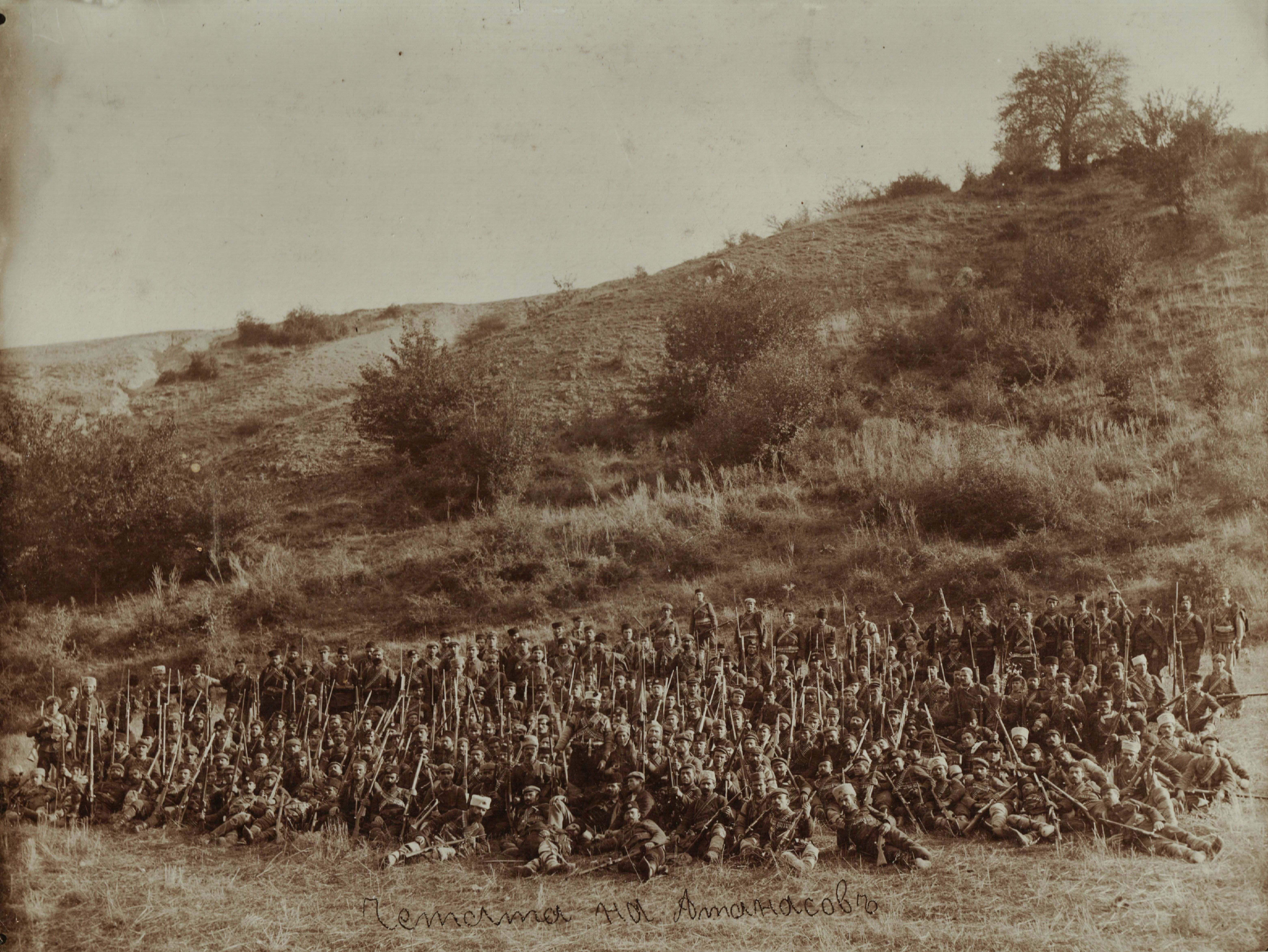 Снимка на сборната чета на Сотир Атанасов, Антон Шипков, Илия Карабиберов и Димитър Зографов